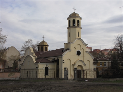 Храм "Св. Троица" в Пловдив